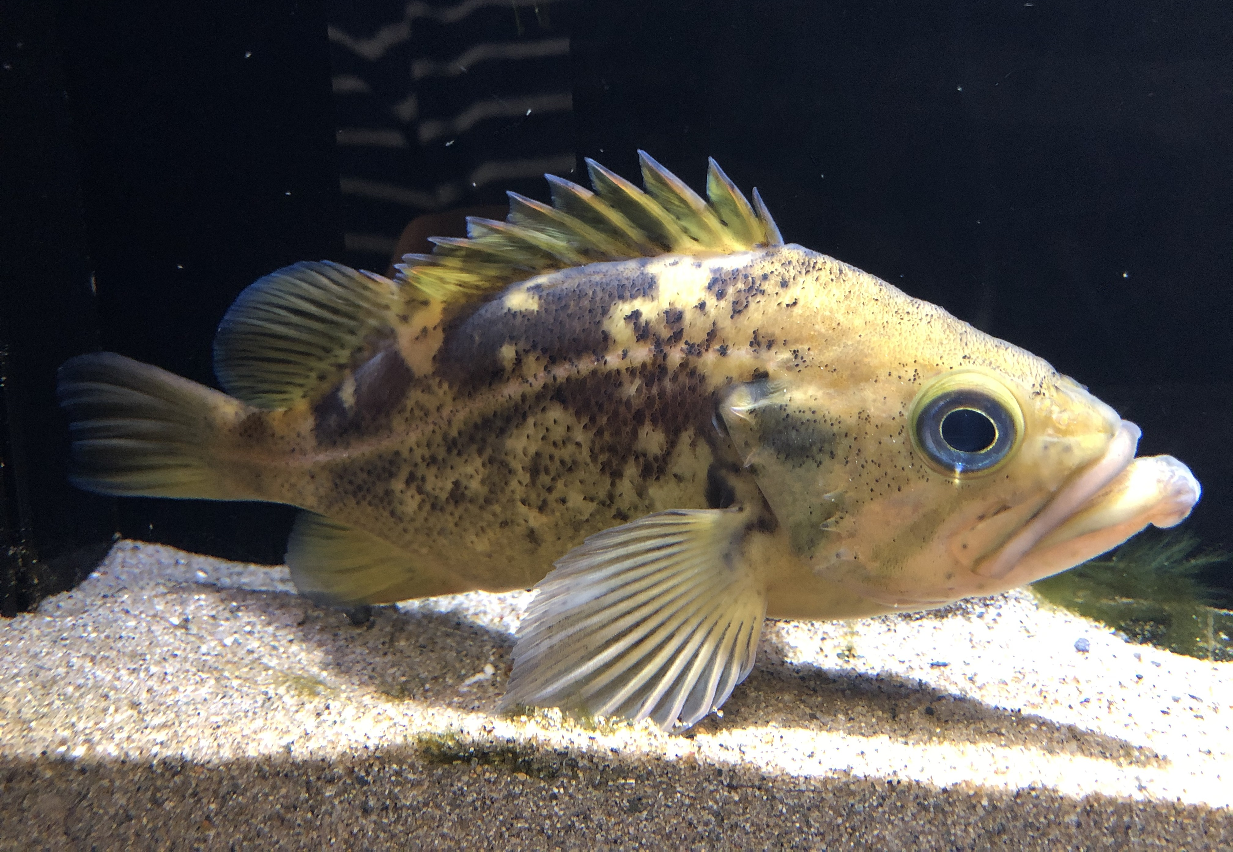 ヤナギノマイ。アクアマリンふくしま飼育展示個体。